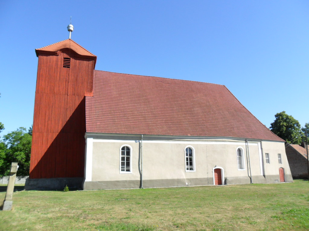 Kościół p.w. św. Józefa w Stargardzie Gubińskim (zabytek nr rejestr. 1628)